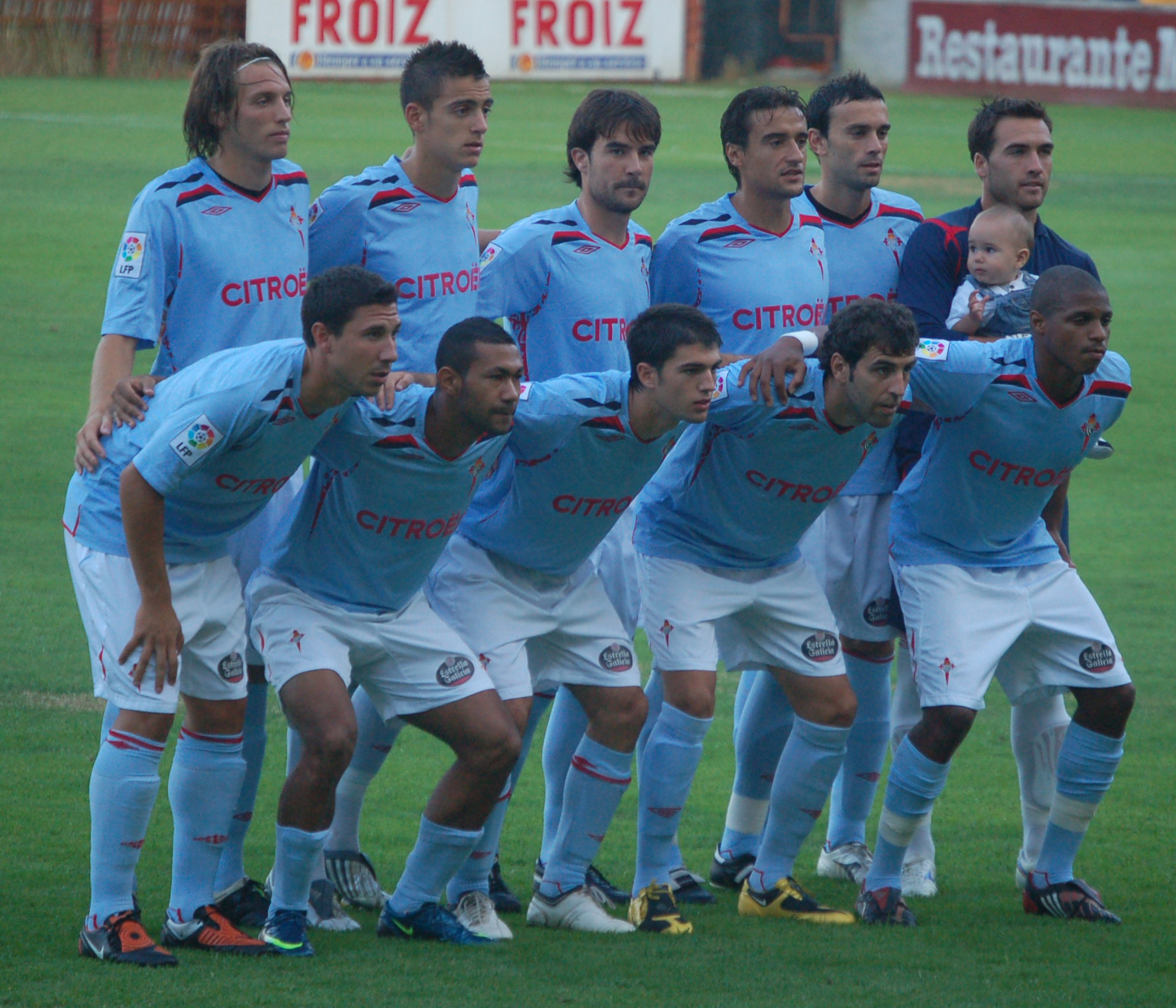 11 inicial do Real Club Celta de Vigo no trofeo Cidade de Pontevedra 2009